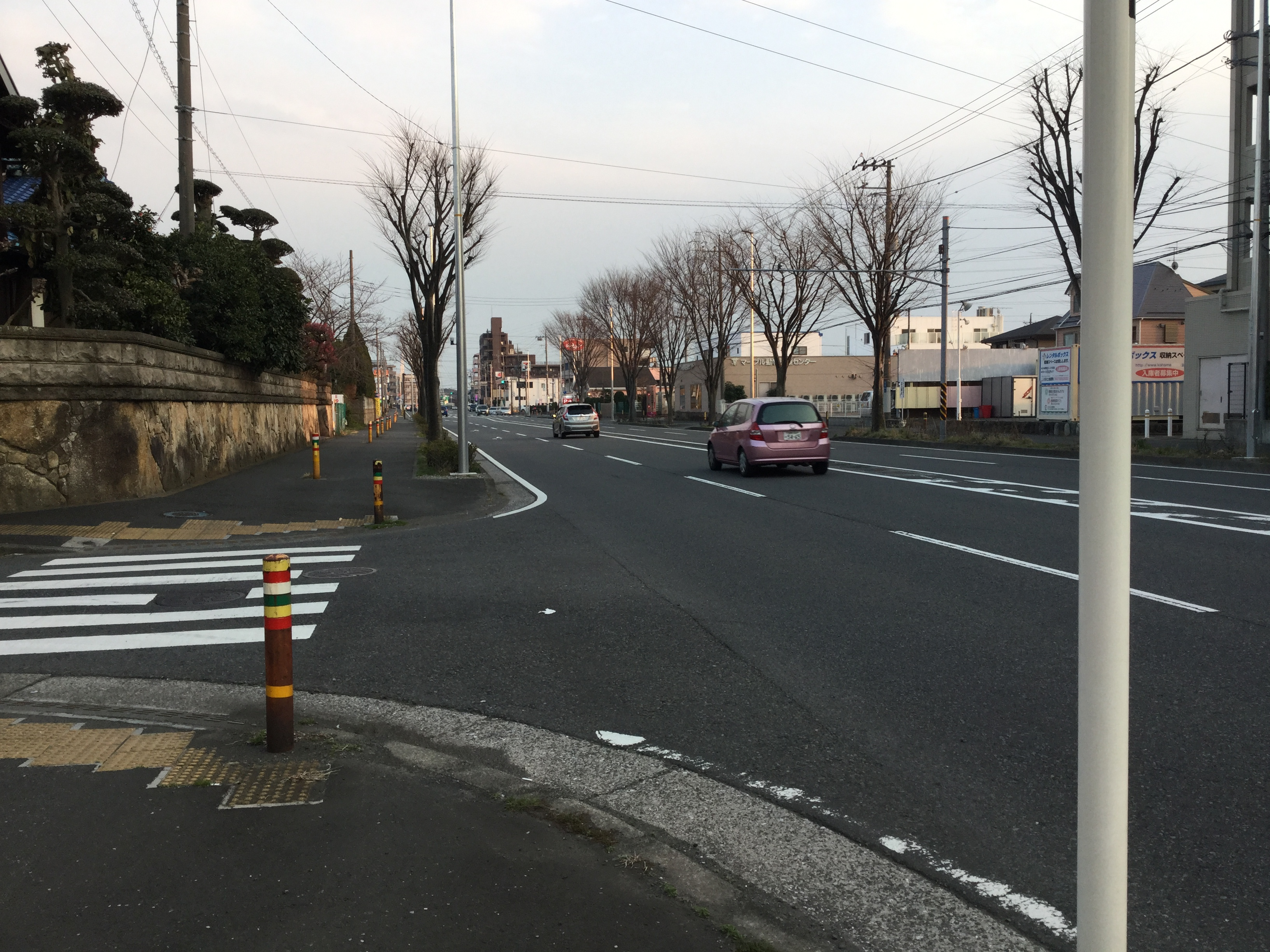 神奈川県道43号線（藤沢厚木道） 神奈川県藤沢市石川一丁目付近